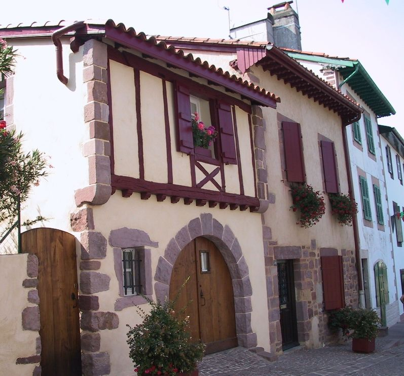 Description: Saint-Jean-Pied-de-Port - Rue de la citadelle - Maisons basques Date: 13 août 2003 Auteur: Licence:CC-BY-SA FR 2.0